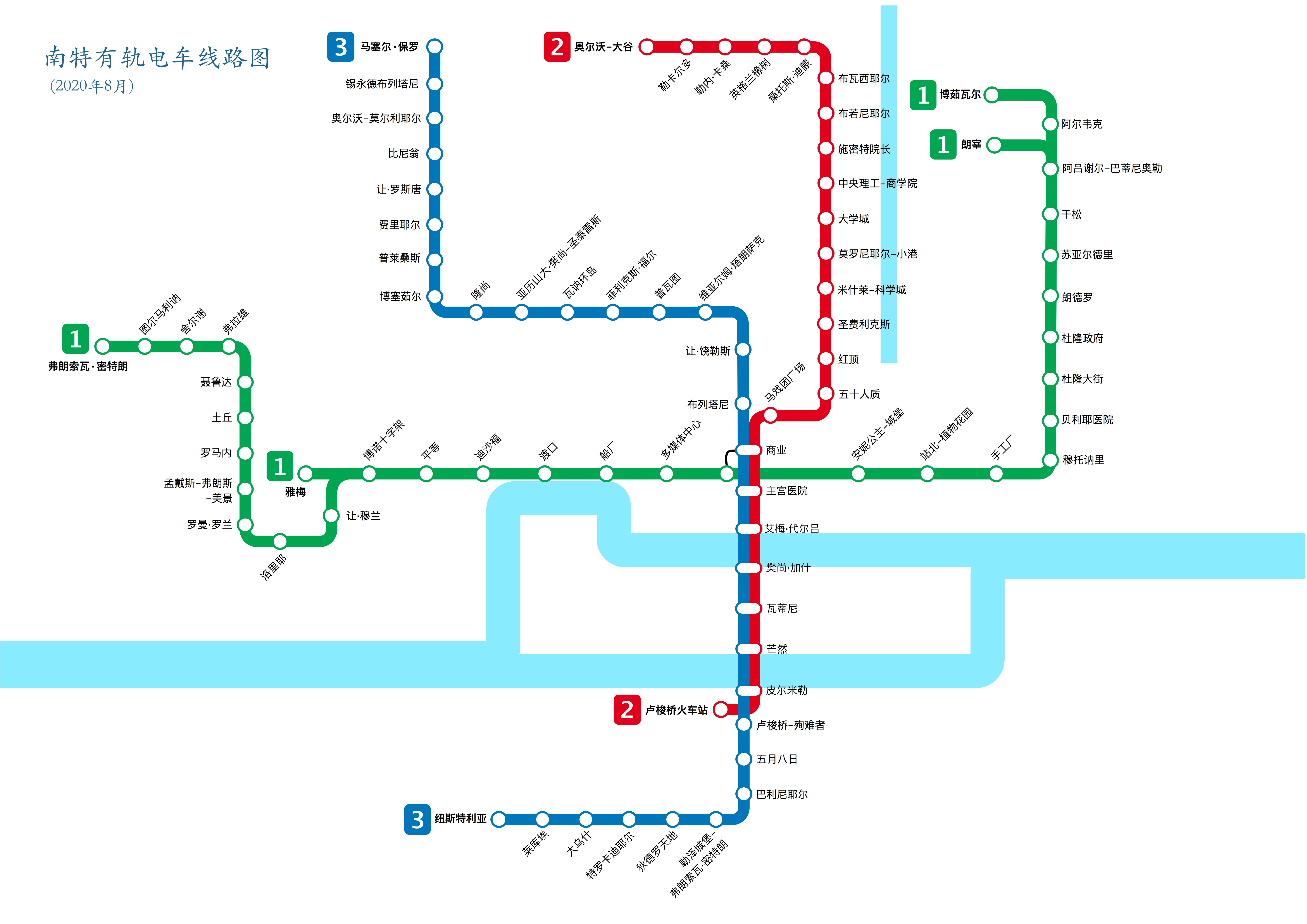 Plan du réseau de tramway de Nantes en mandarin